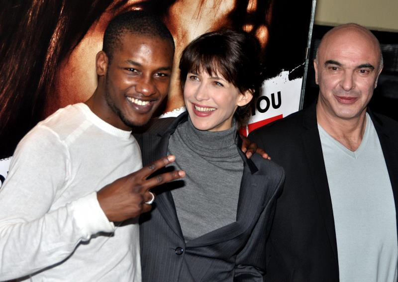 Avant-première du film "Arrêtez-moi" : Yann Ebonge, Sophie Marceau et Jean-Paul Lilienfeld